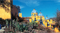 Pueblo Pedro Escobedo